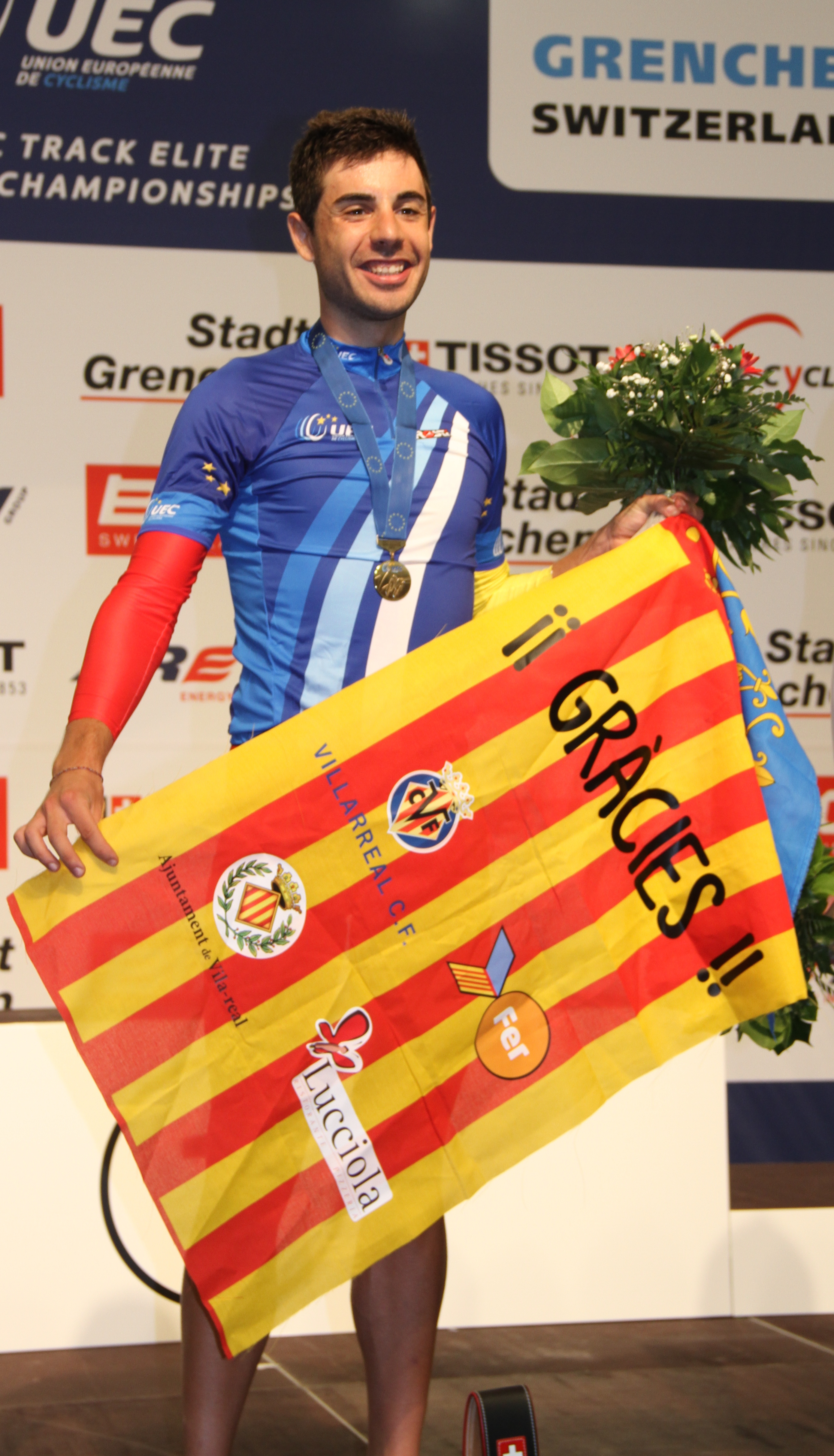 Sebastián Mora, spanischer Radsportler The making of this document was supported by the Community-Budget of Wikimedia Germany.